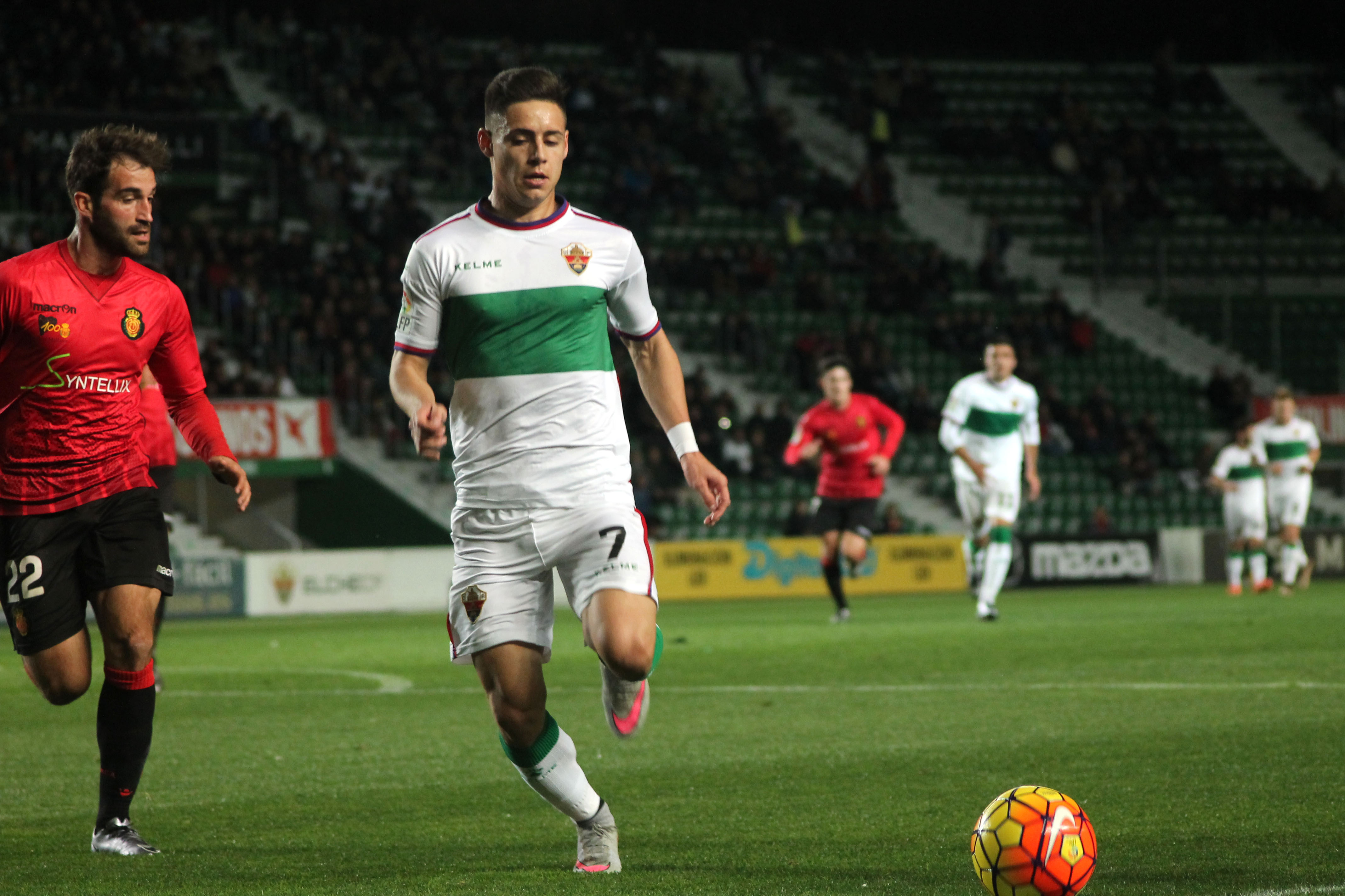 Elche vs Mallorca